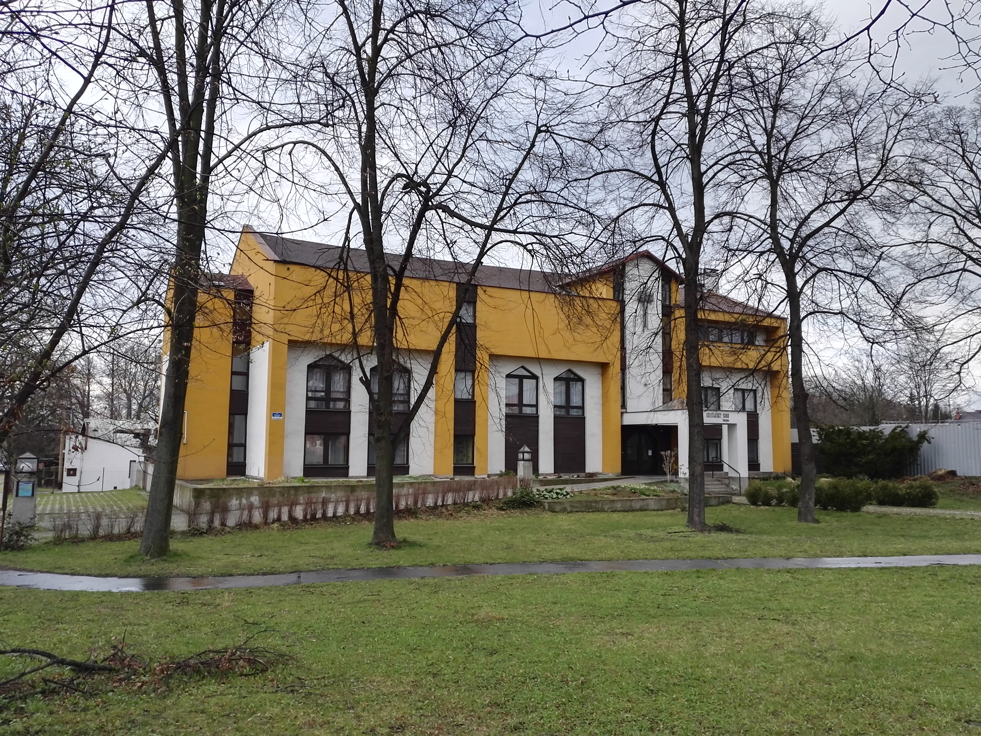 Ostrava-Kunčičky. Křesťanský sbor.